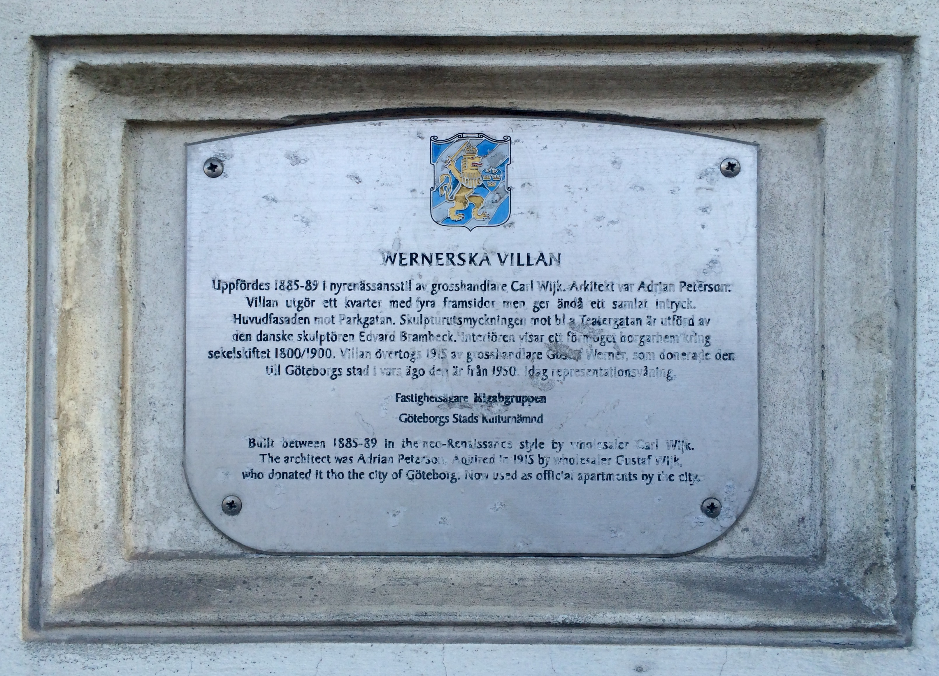 Plakett uppsatt på fasaden till Wernerska villan vid Parkgatan 25 i Göteborg. Uppsatt som en del av Göteborgs stads kulturnämnds "Projekt Husmärkning" kring år 2000/2001 då drygt hundra skyltar sattes upp. Se även boken "100 utmärkta hus i Göteborg". Vid en inventering 2016 satt 69 skyltar fortfarande uppe.